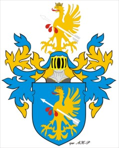 Herb baronów von und zu Hohenstein (opr. AK-P) Jestem autorem tej grafiki (moje godło zgodnie ze zwyczajem zamieściłem na grafice). Zgadzam się na jej wykorzystanie w wikipedii, bo też i sam ją tam osobiście umieściłem, jako ilustrację do artykułu, którego pierwszą wersję popełniłem. Pozdrawiam --AK-P 16:01, 29 wrz 2005 (CEST)